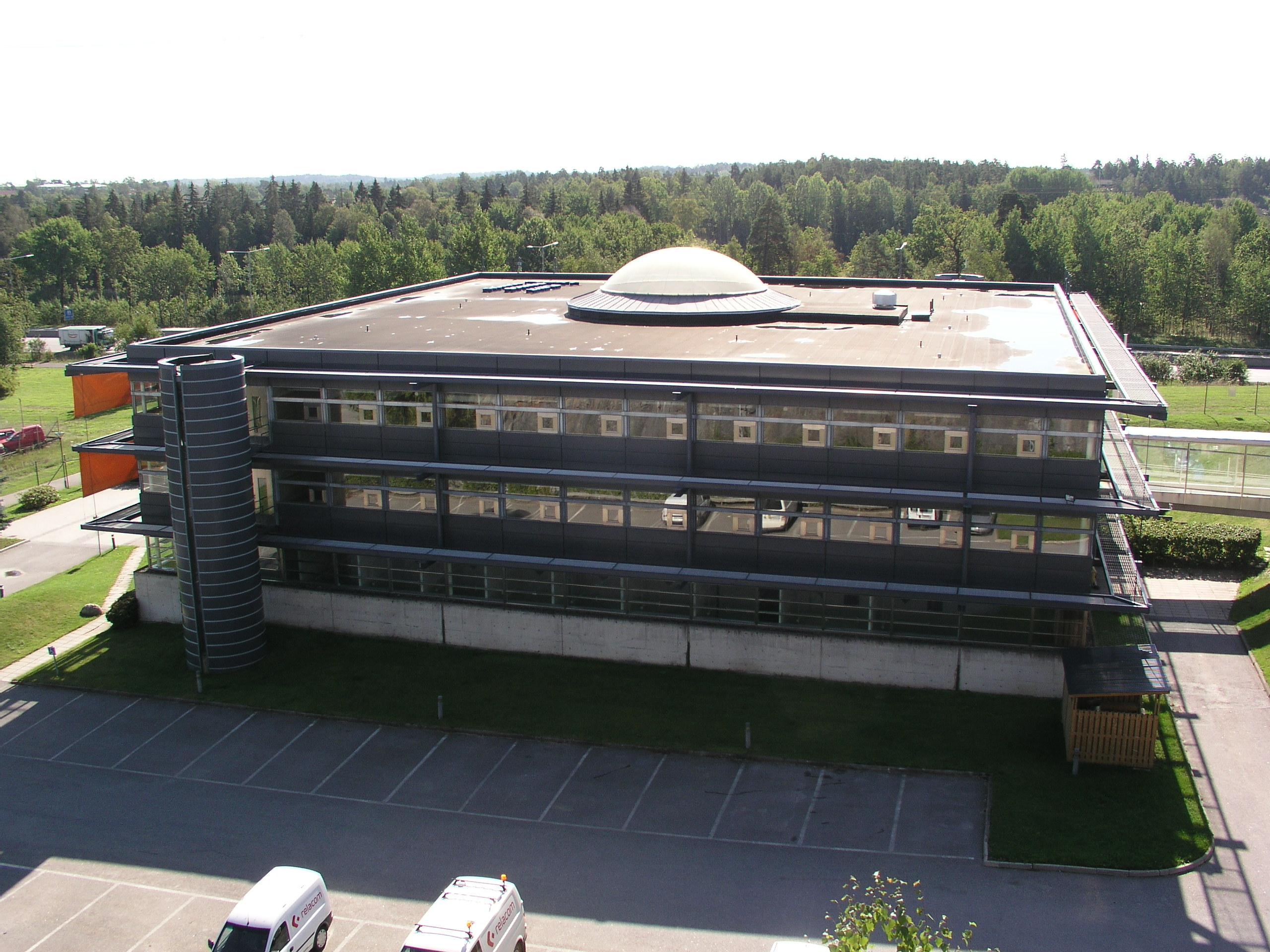 Canonhuset outside sätra. Picture taken by johan eriksson 2006.